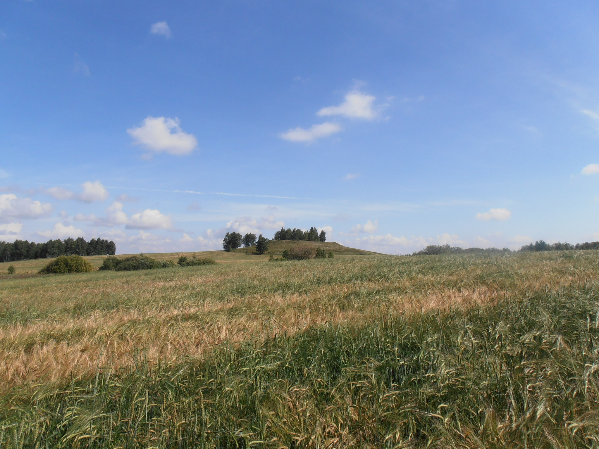 Хрипуновский могильник в Ингальской долине (Исетский район Тюменской области, к югу от с. Красногорское). Южная сторона.